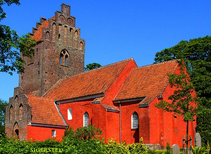 fra sydøst